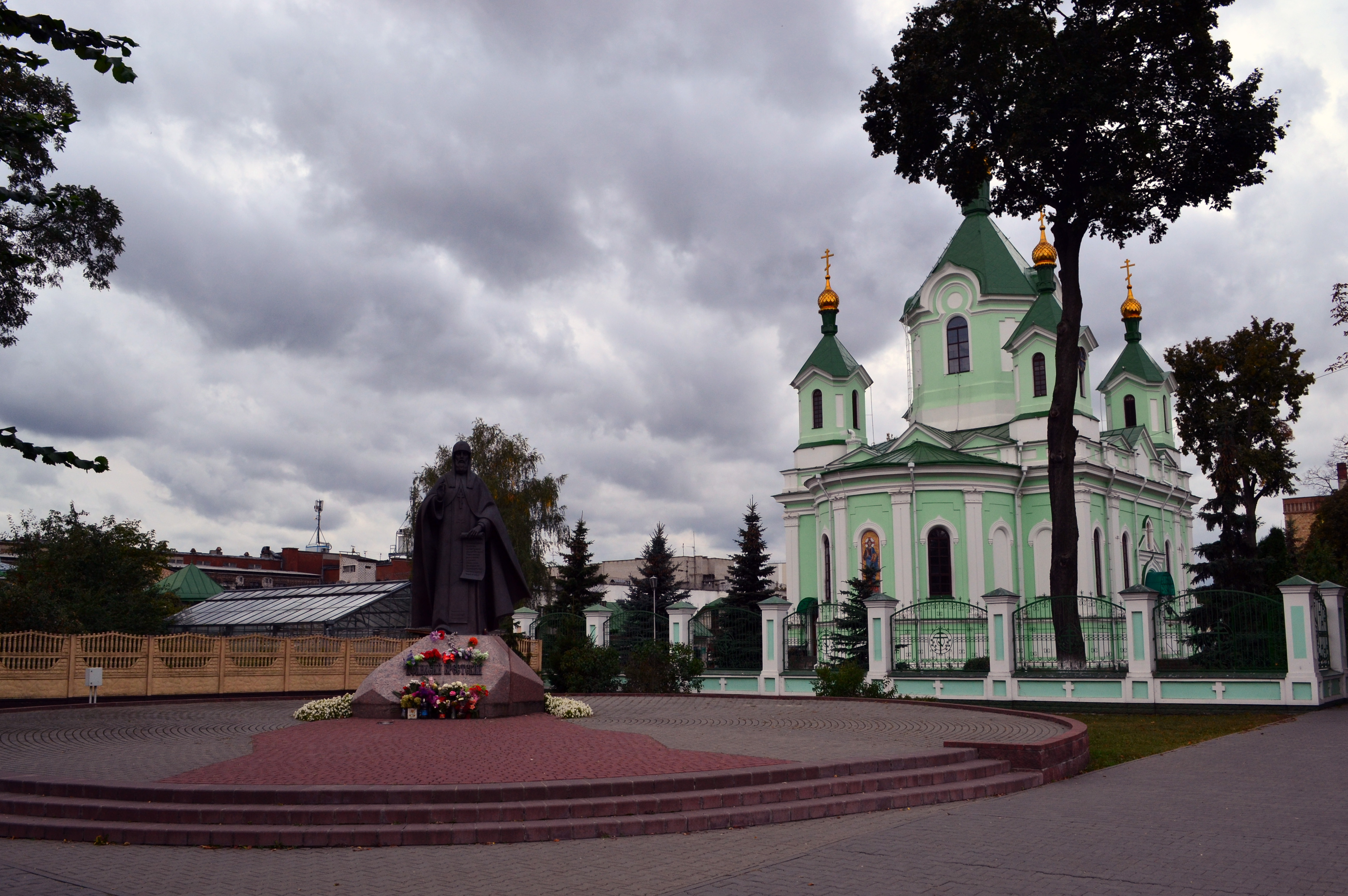 Беларуская (тарашкевіца): Сьвята-Сімяонаўскі сабор. м. Берасьце This is a photo of Belarusian heritage monument. Reference number: 113Г000016 ( WLM)